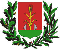 coat Budapest 15 district